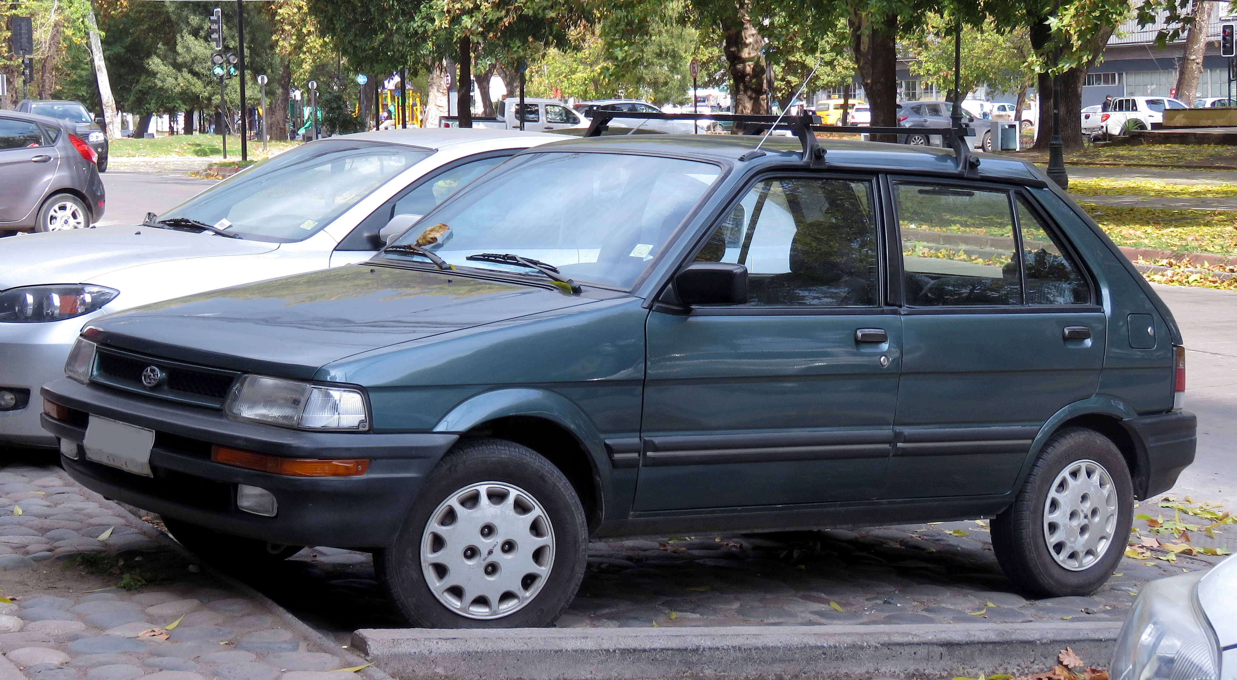 Subaru Justy 1.2 GL 1991